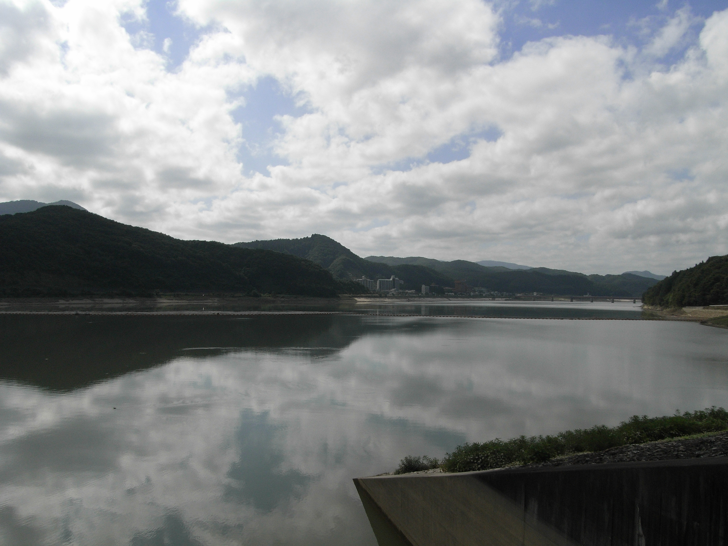 Lake